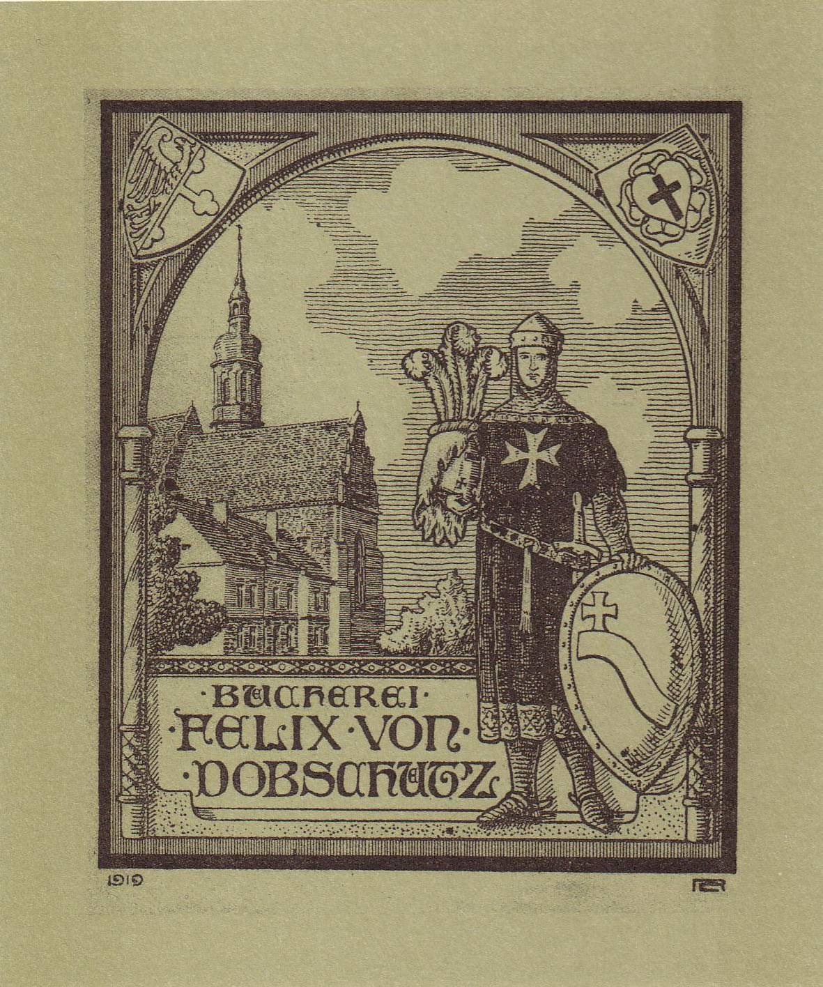 Exlibris von Felix von Dobschütz, Oppeln (Silesia) 1919. Es zeigt den Johanniter-Ritter mit dem Dobschütz-Wappenschild und 3 Straußenfedern auf seinem Helm neben der Oppelner Stadtpfarrkirche, der langjährigen Wirkungsstätte des Superintendenten. Zinkografie in Grün (92 x 79 mm), Zeichner: Lorenz M. Rheude.